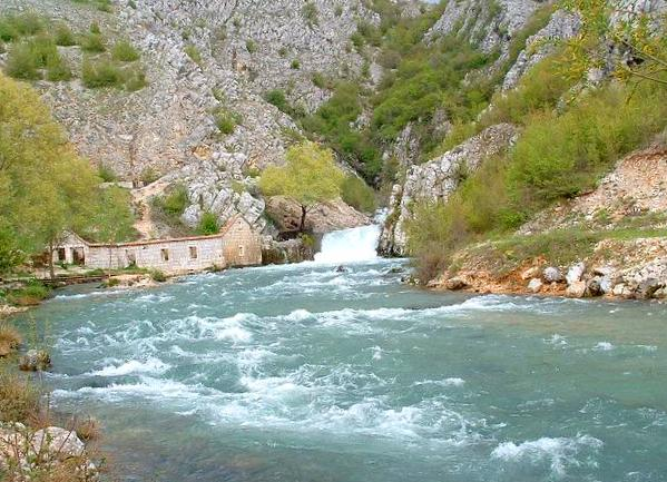 Ruda – rijeka u Sinjskom polju, lijeva pritoka Cetine.